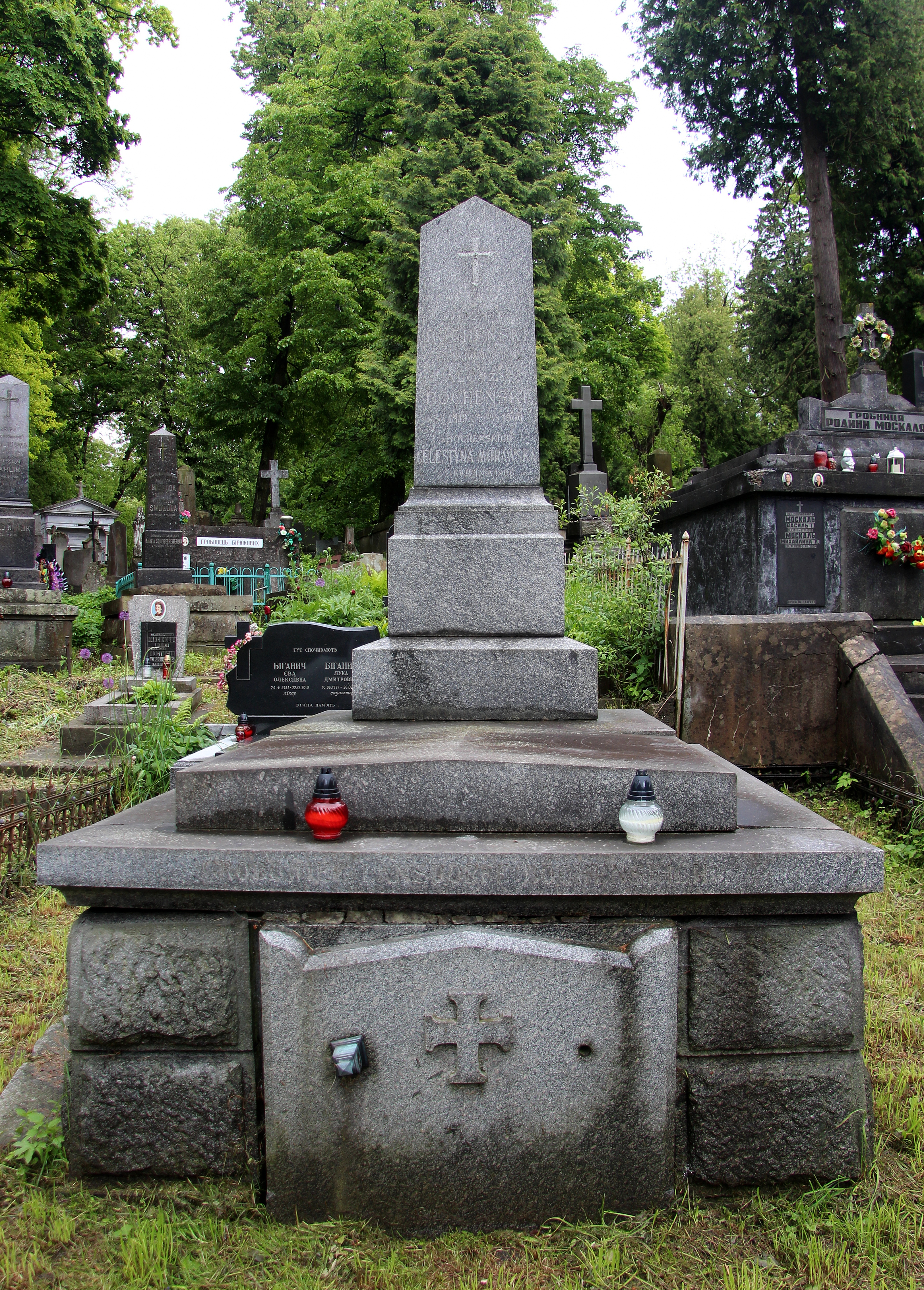 Гробівець родини Боченських. Личаківський цвинтар , поле № 69.